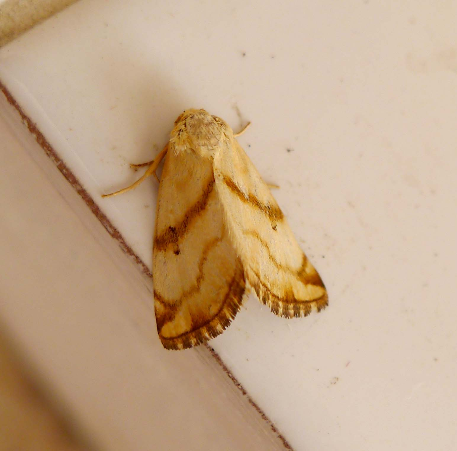 Jimena, Andalucia, Spain